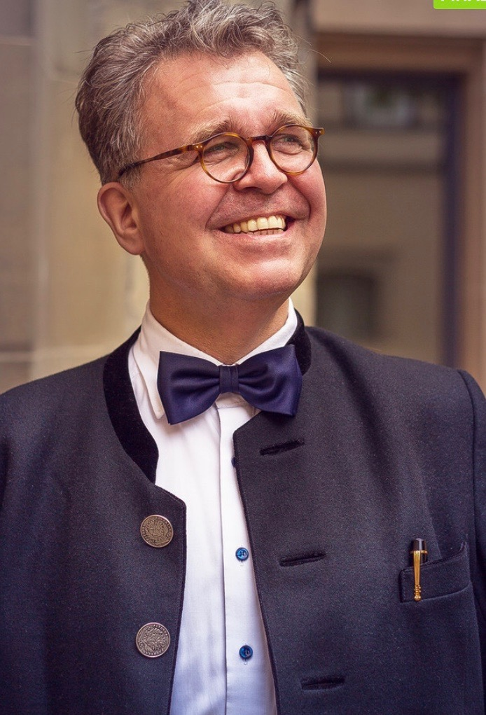 Foto zur Wahlkampagne Landtagswahl B-W 2016 in Göppingen